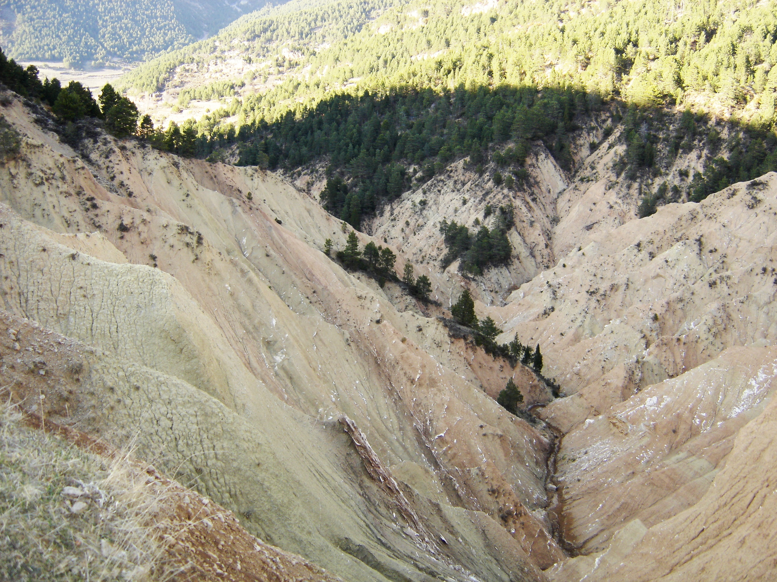 El naixedment del riu Mosoll (Guixers, Solsonès) a les Terreres de Pratformiu.